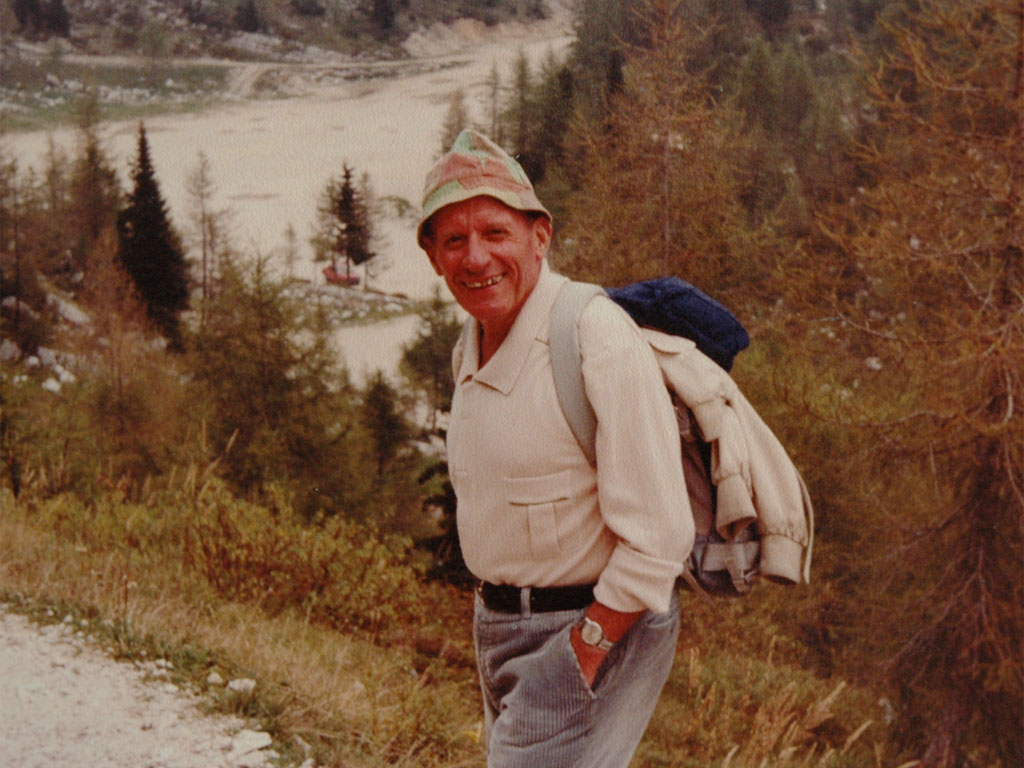 Gianni Pieropan a Piazzale Lozze (zona Monte Ortigara) nel 1981